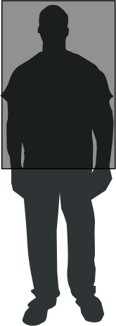 يمثل المربع الرمادي المساحة المثالي المعتادة للغة ASL، والتي من المرجح أن ميل مستخدم BASIL ؟لإ لإنتاج إشارات خارجها عن غيره من مستخدمي لغة الإشارة